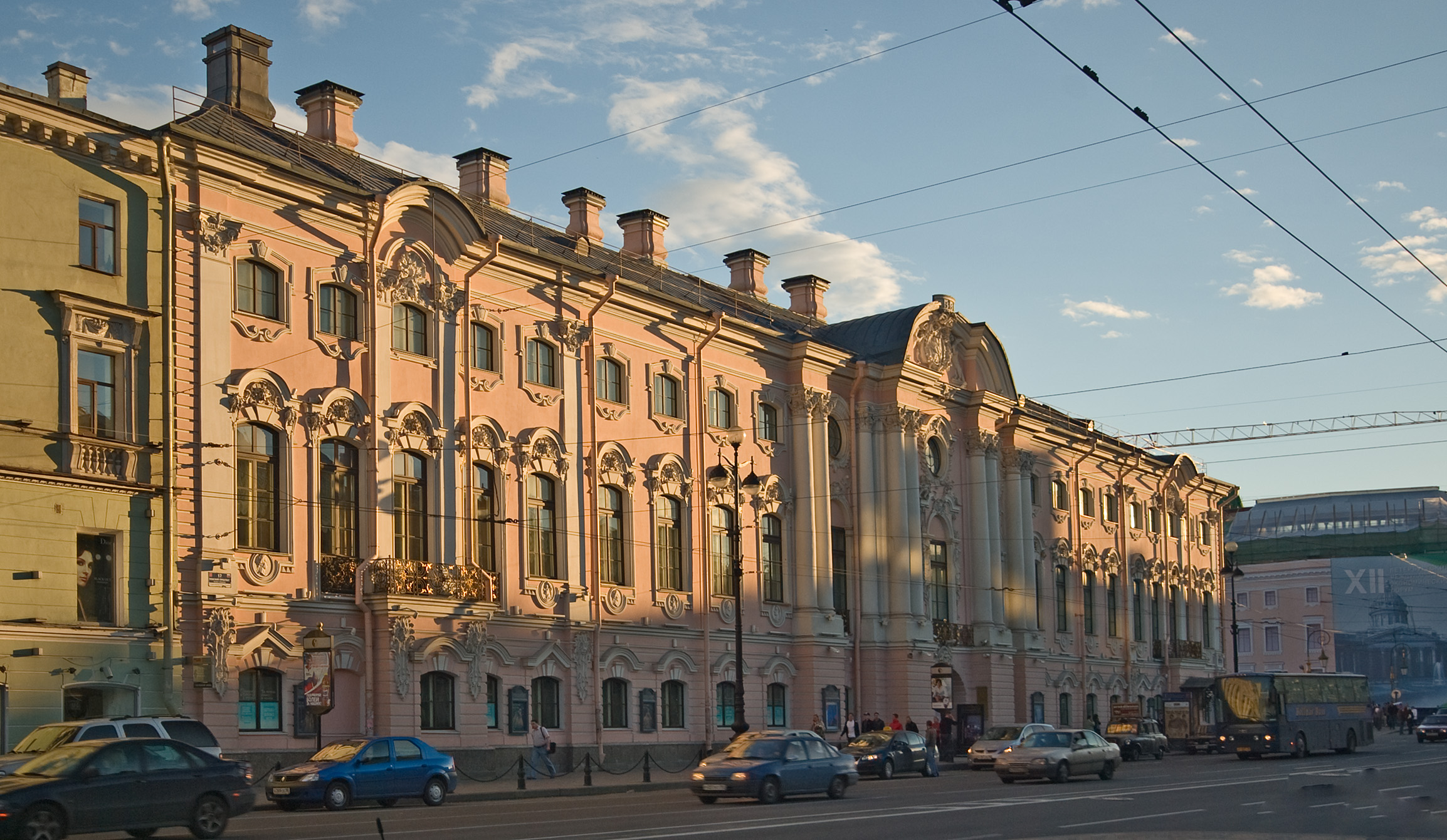 Строгановский дворец, Санкт-Петербург. Фасад со стороны Невского.